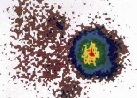 Szintigrafie eines autonomen Schilddrüsenadenoms